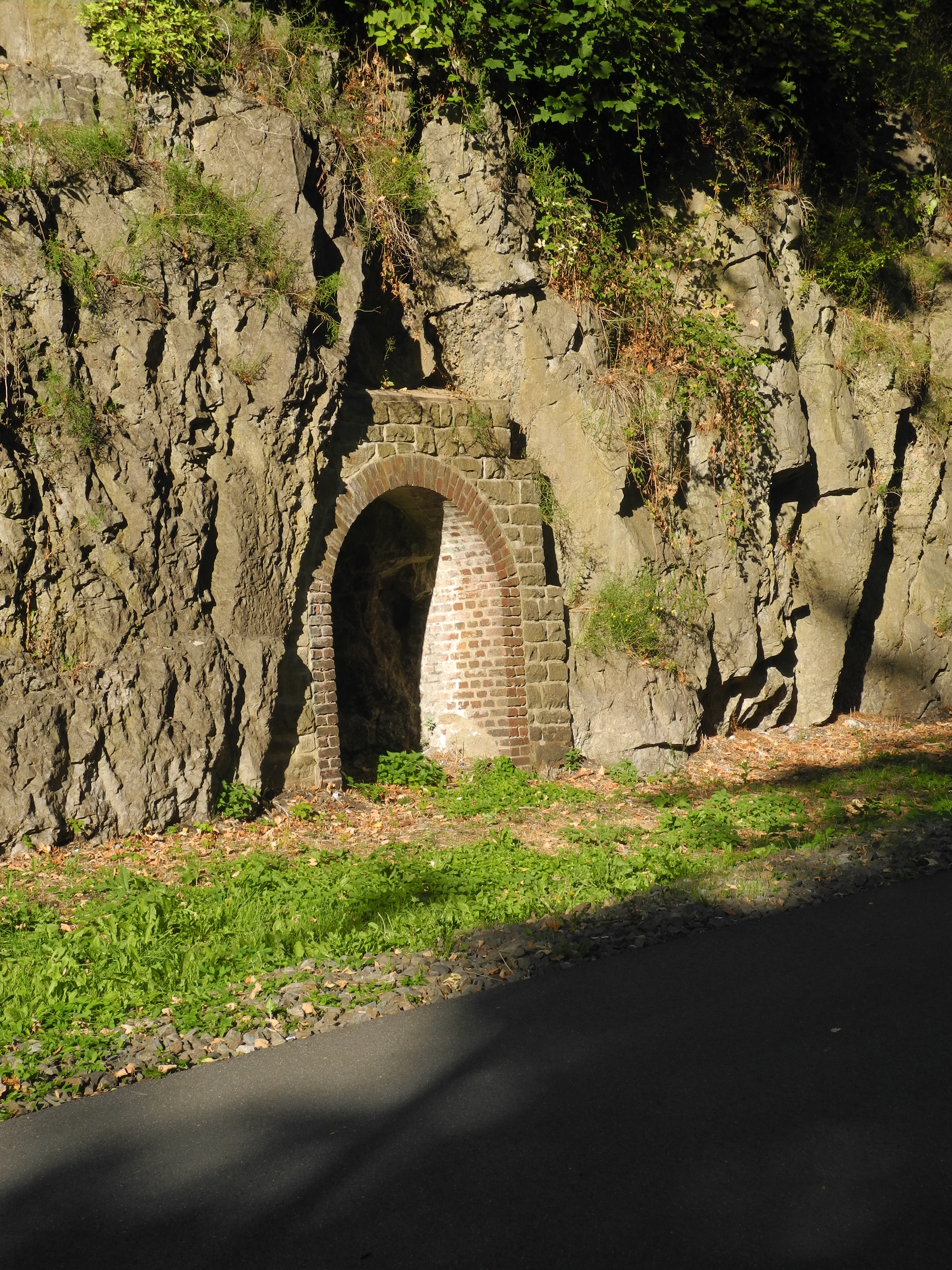 Wuppertal, Schutznische in der Bramdelle, dem mit über 25 Metern tiefsten Geländeeinschnitt der Nordbahntrasse